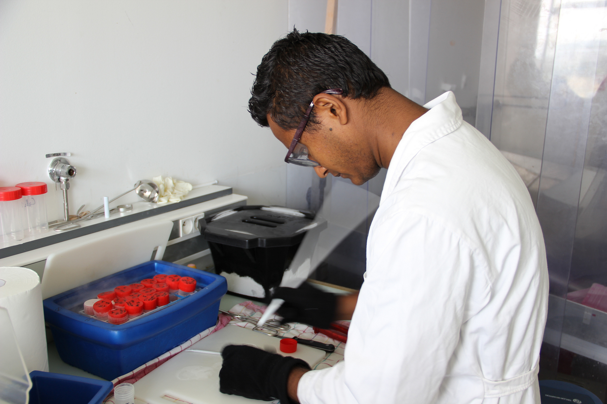 Laboratoire Agroparc Avignon